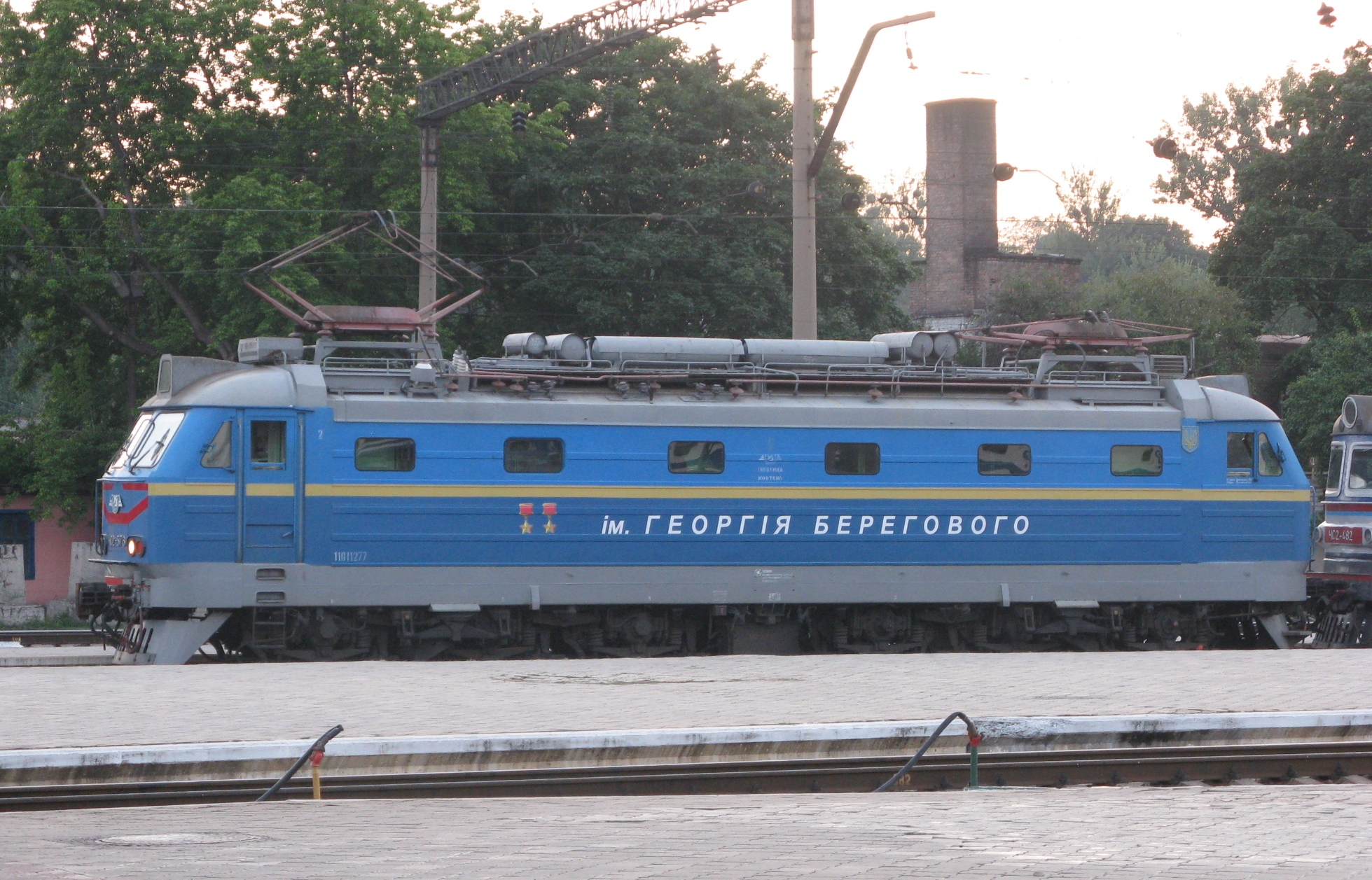 Локомотив поезда Георгий Береговой. 15 апреля 2011 г. Южная железная дорога с Карловского железнодорожного вокзала торжественно запустила новый поезд № 92/91 сообщением «Полтава — Москва» под названием «Георгий Береговой».